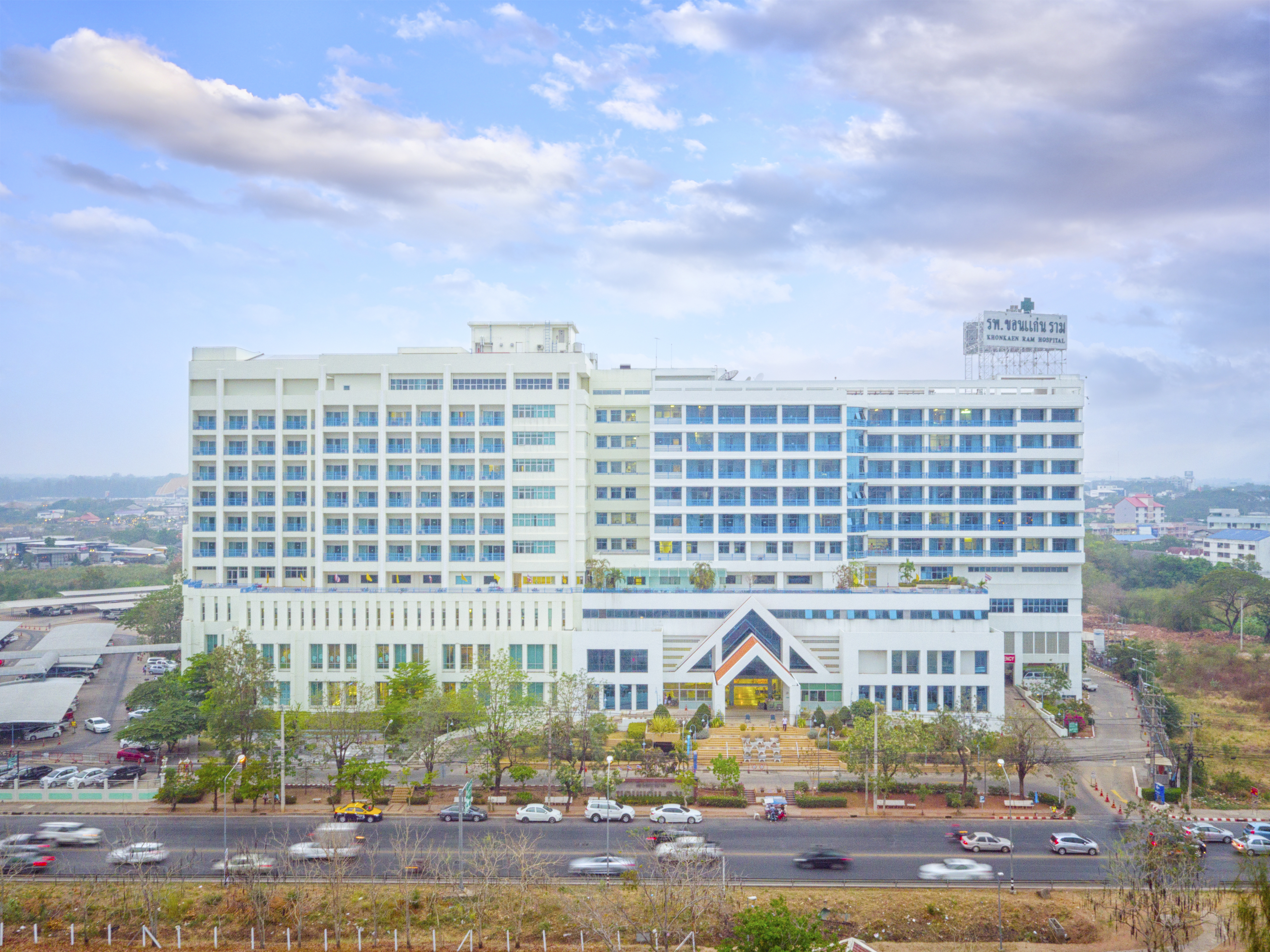 โรงพยาบาลขอนแก่นราม ถ่ายจากมุมสูง